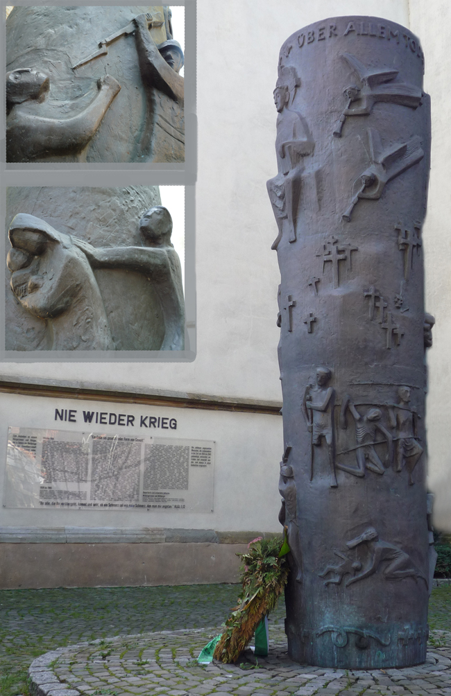 Die Gedenkstätte für die Opfer der beiden Weltkriege an der St. Aegidiuskirche in Wiedenbrück